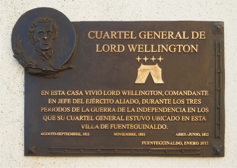 Placa ubicada en la casa de Fuenteguinaldo donde vivió Lord Wellington durante algo más de 100 días.